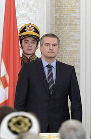 Председатель Совета министров Автономной Республики Крым Сергей Валерьевич Аксёнов